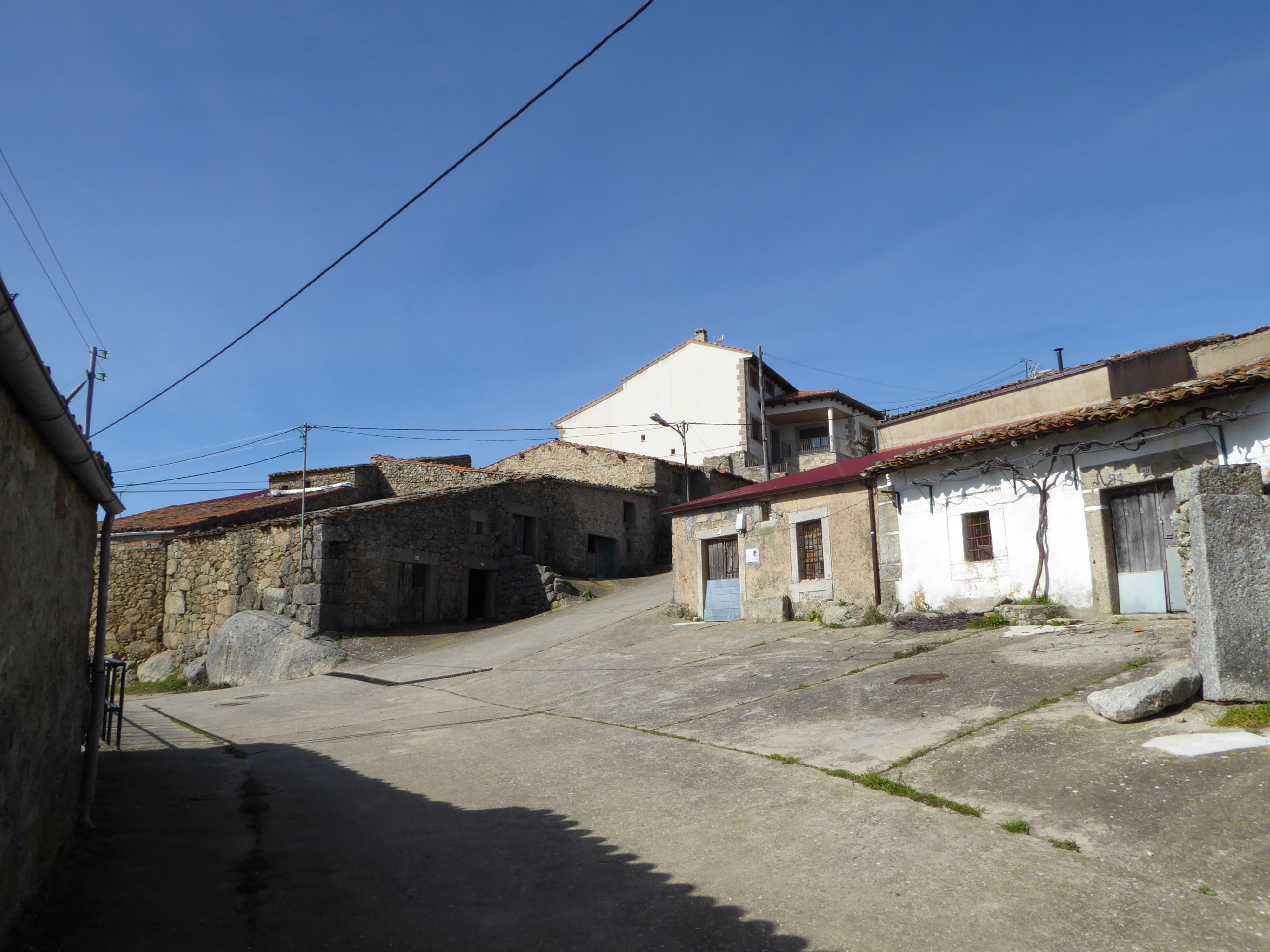 Puebla de San Medel es una población situada en la comarca de la Sierra de Béjar, en de la provincia de Salamanca en Castilla y León